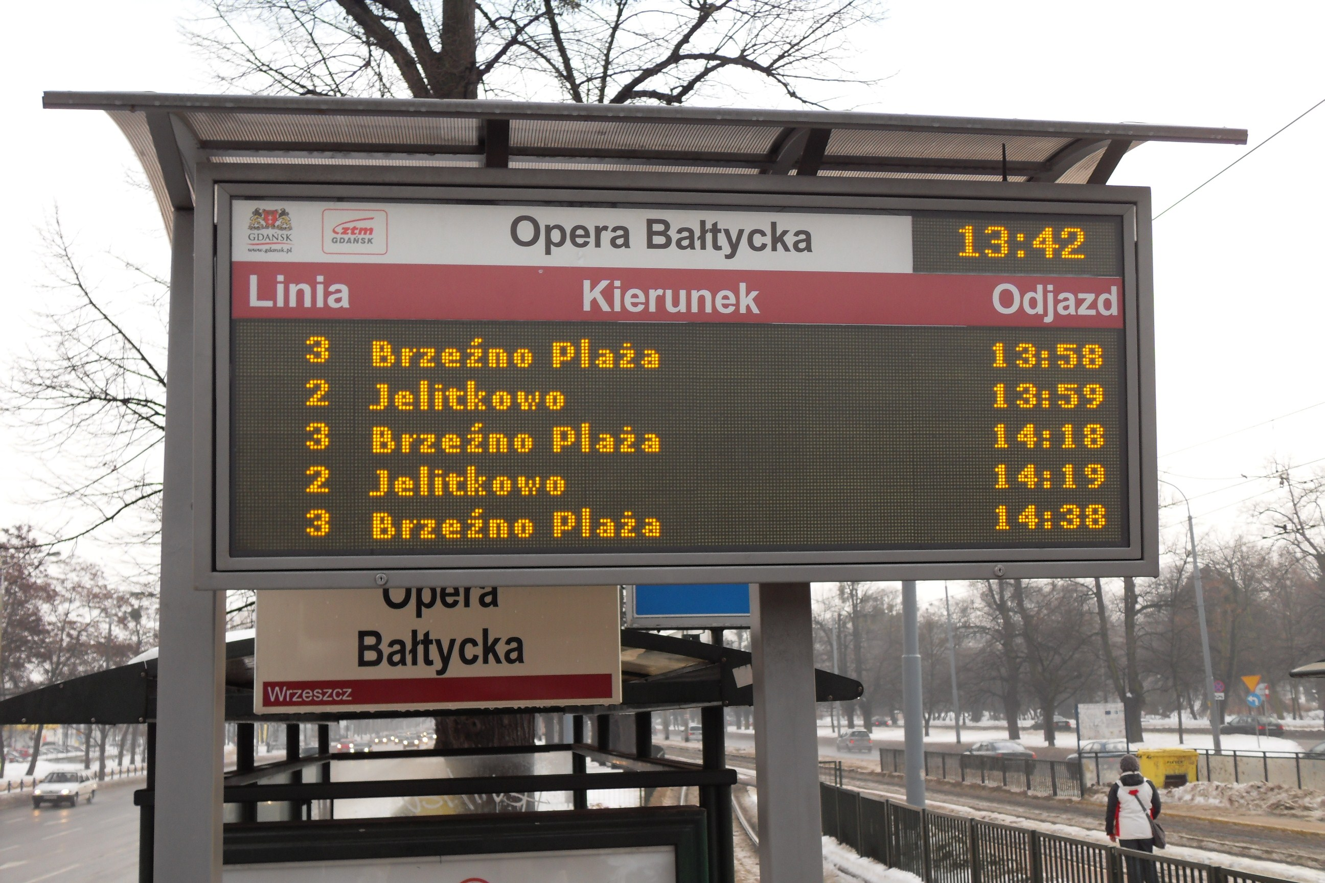 System Informacji Pasażerskiej (SIP) w Gdańsku - monitor diodowy.